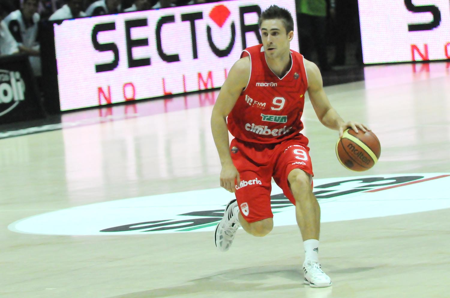 Andrea De Nicolao